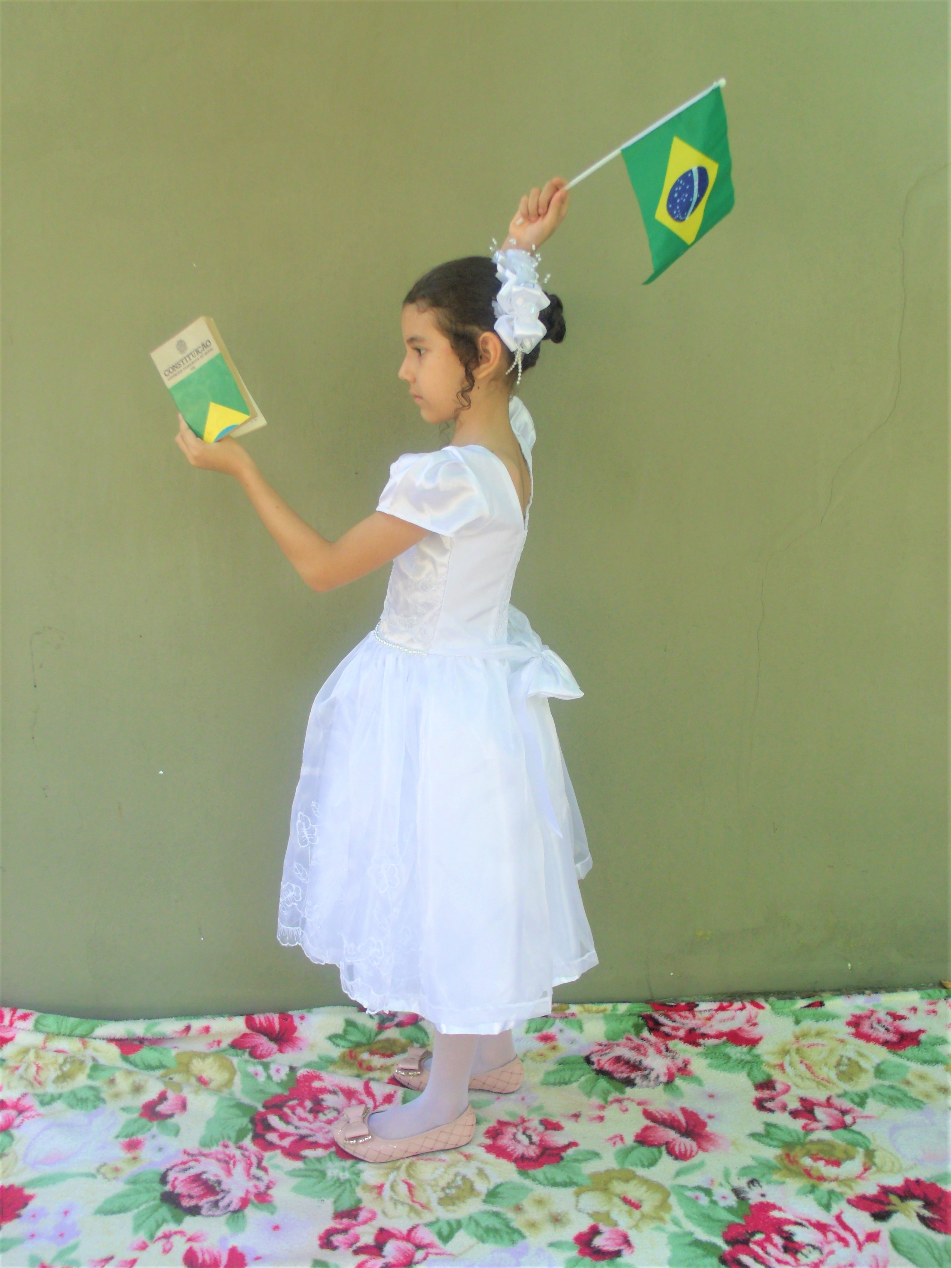 Alegoria fotográfica cujo tema é Constituição do Brasil.